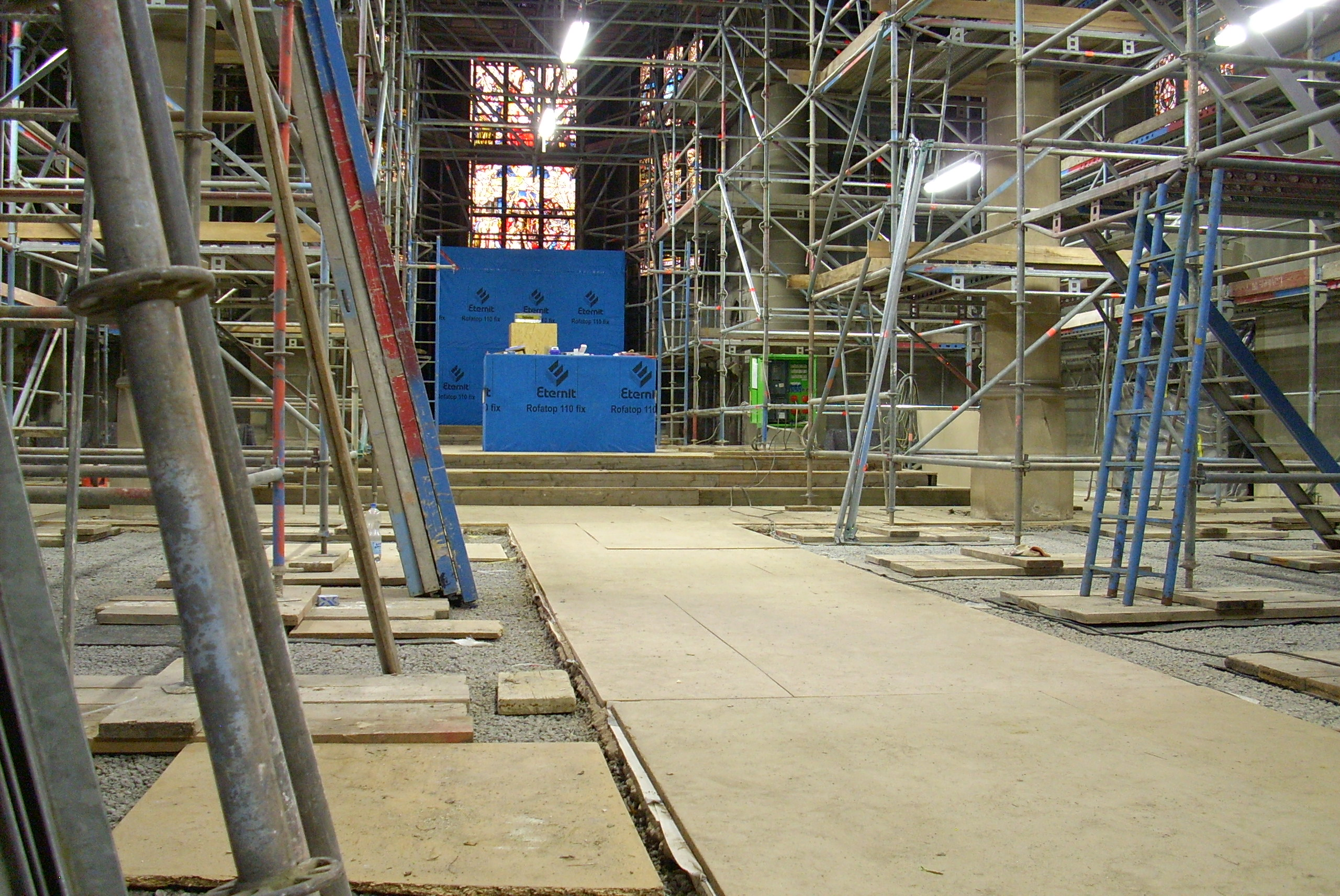 Gerüste in katholischer Pfarrkirche St. Matthäus Bad Sobernheim